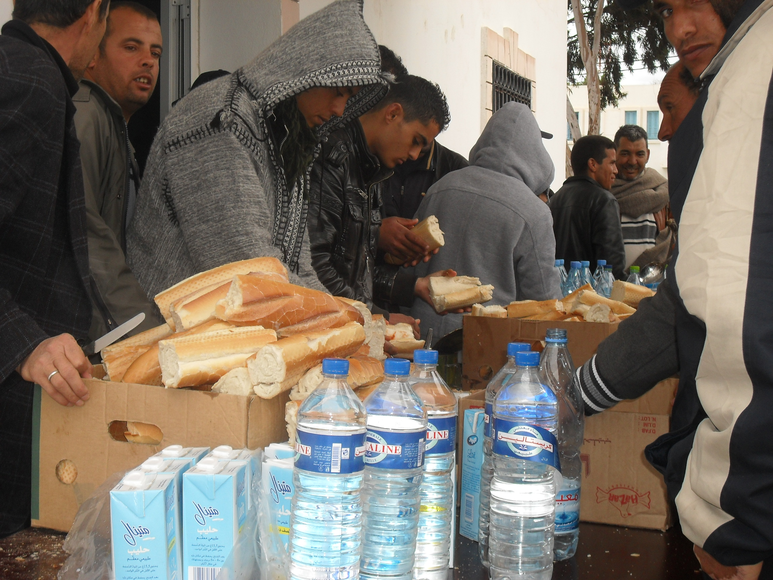 [Houda Trabelsi] In an outpouring of support, Tunisians offered food and shelter to refugees escaping the violence in Libya. في تدفق للدعم، يقدم التونسيون الأكل والمأوى للاجئين الفارين من العنف بليبيا Dans un grand élan de soutien, les Tunisiens offrent de la nourriture et un abri aux réfugiés qui fuient les violences en Libye. The story: القصة L'article